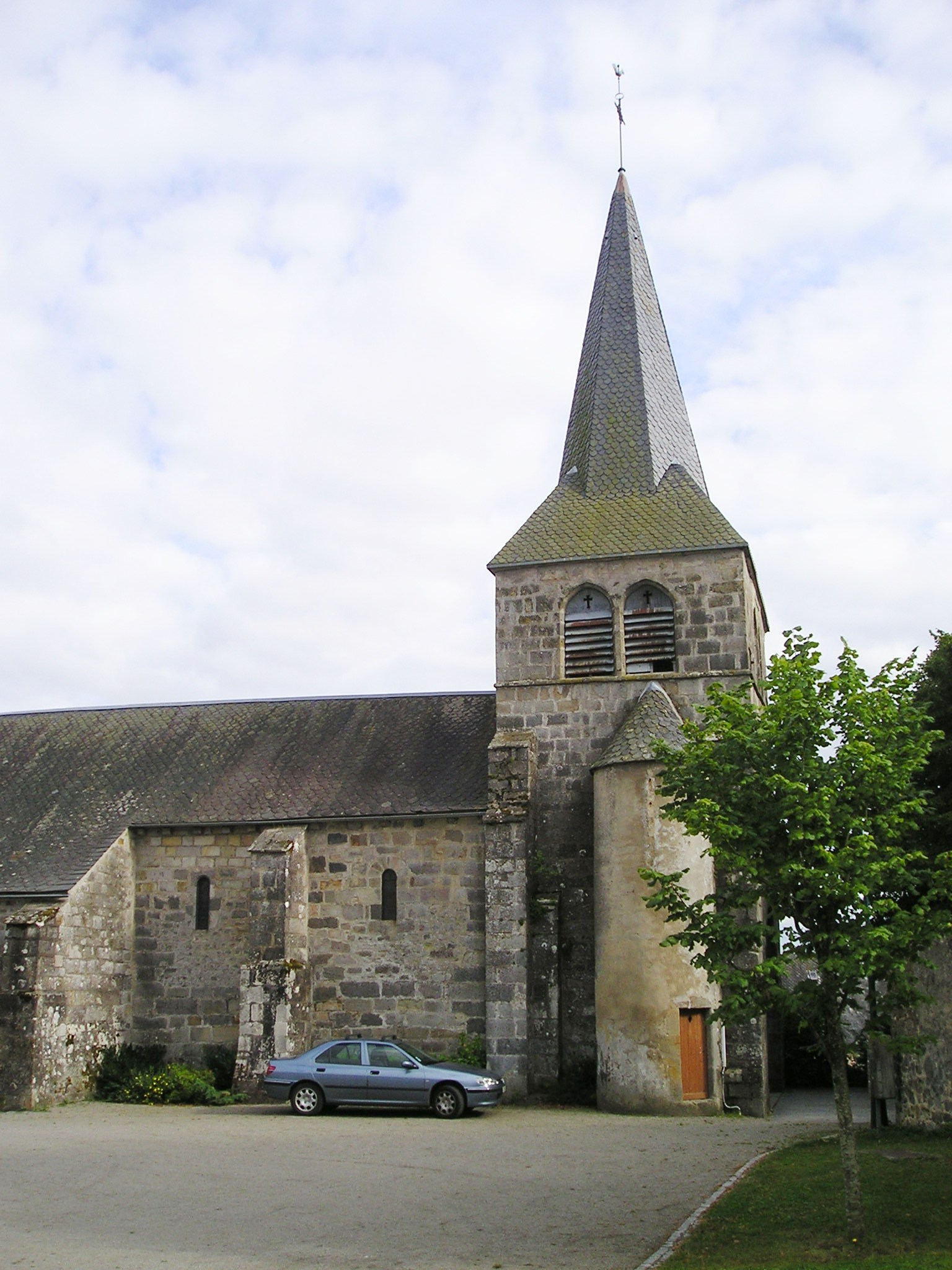 Larodde,_Kirche